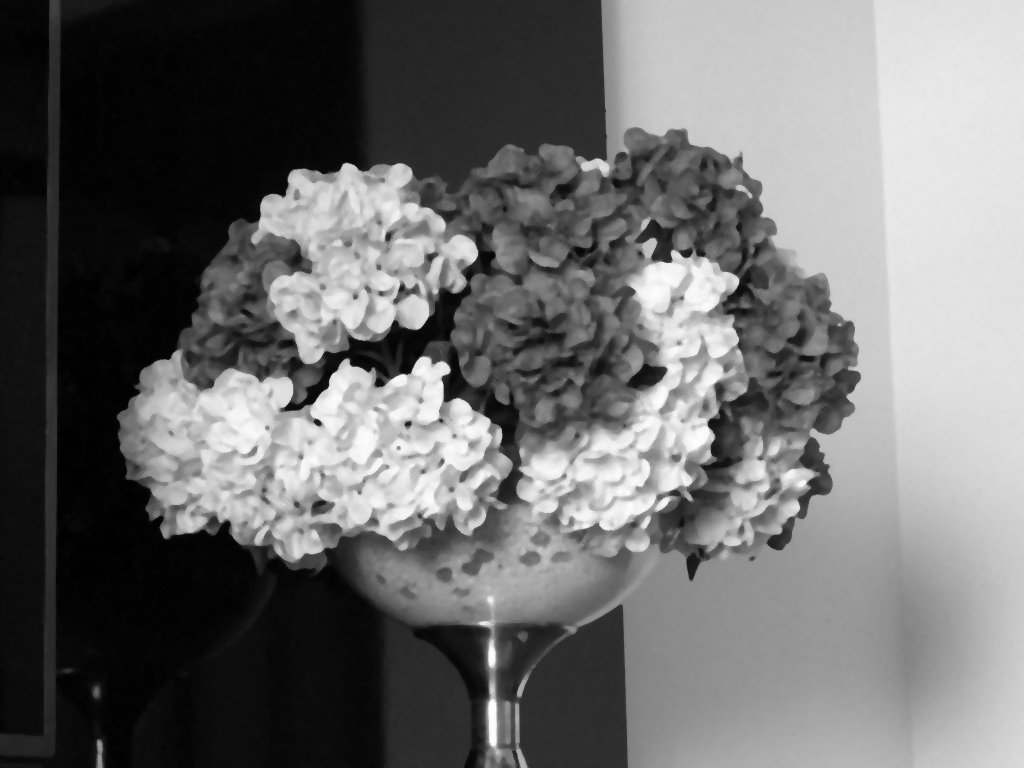 Tamanho da máscara - 3x